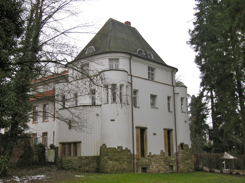 Mühltal-Traisa Dippelshof. Seit 2009 ist er einer der offiziellen Trauorte der Gemeinde Mühltal.